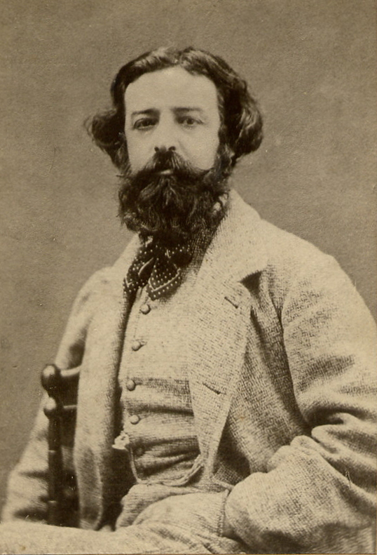 Manuel Rafael García Aguirre Ministro Plenipotenciario argentino en los Estados Unidos de 1868-1873